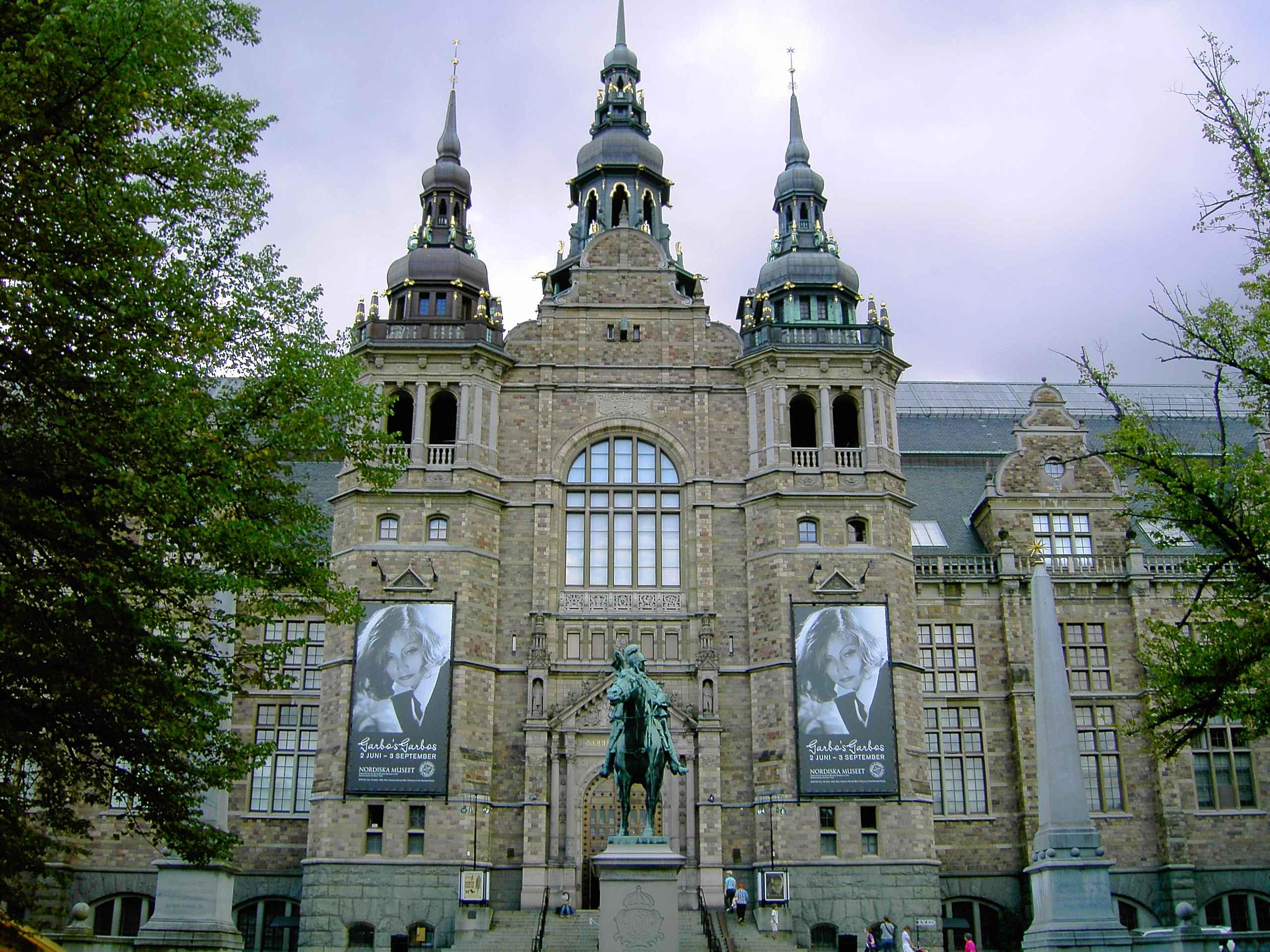 Nordiska museet (Nordisches Museum), Stockholm (Sweden)